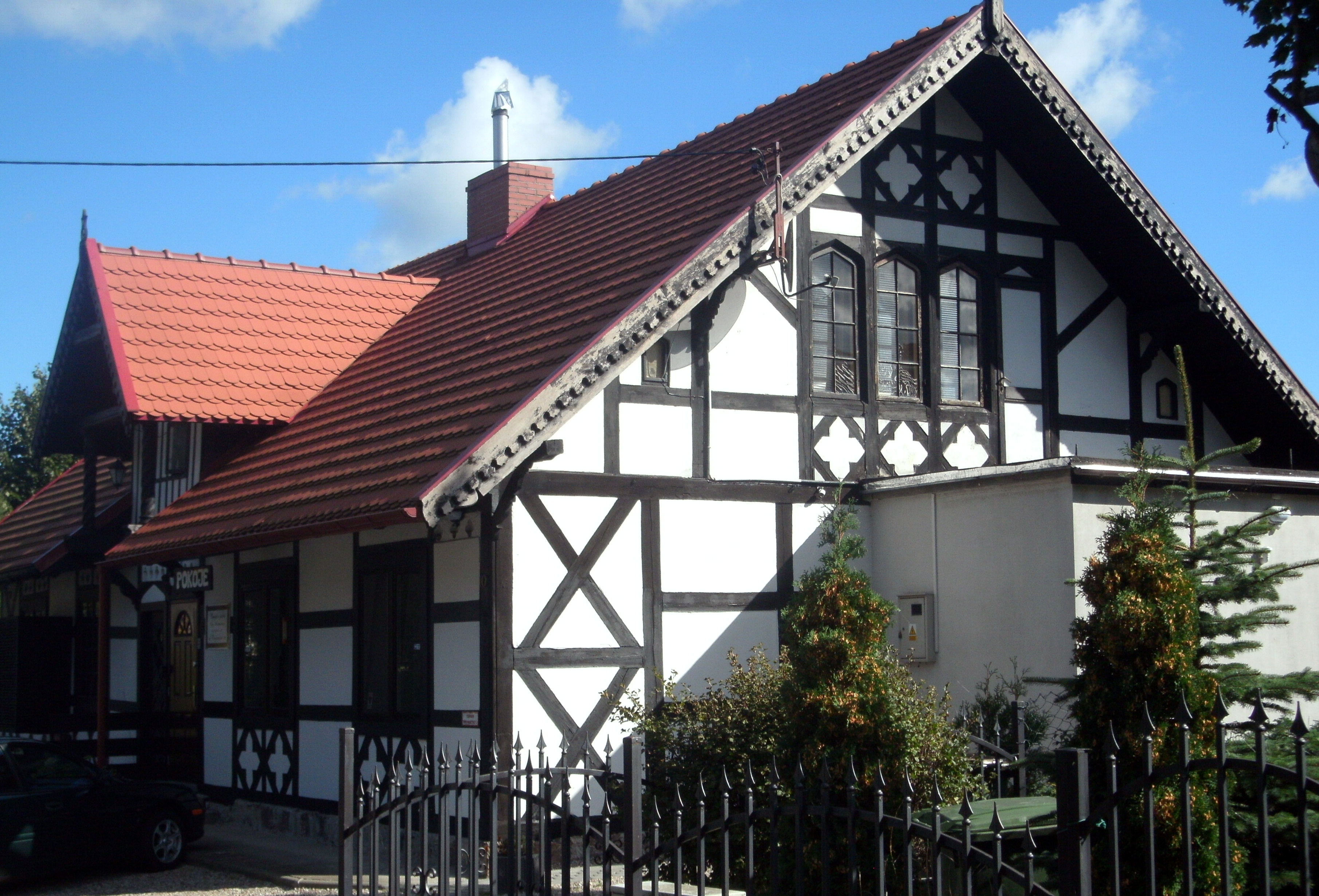 Krynica Morska, Turystyczna 10/12 (dawniej ul. Gdańska 23) - dom, kon. XIX